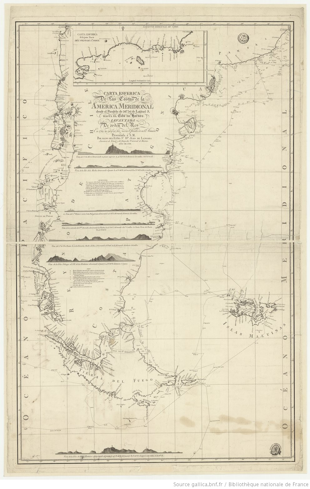 mapa del límite entre el Reino de Chile y la Patagonia Oriental